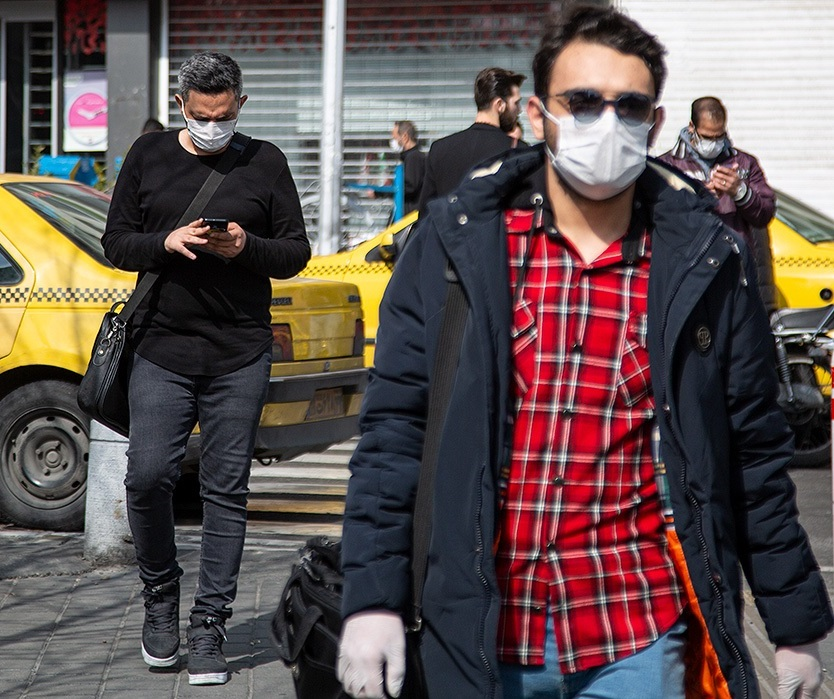 ماسک و مردم